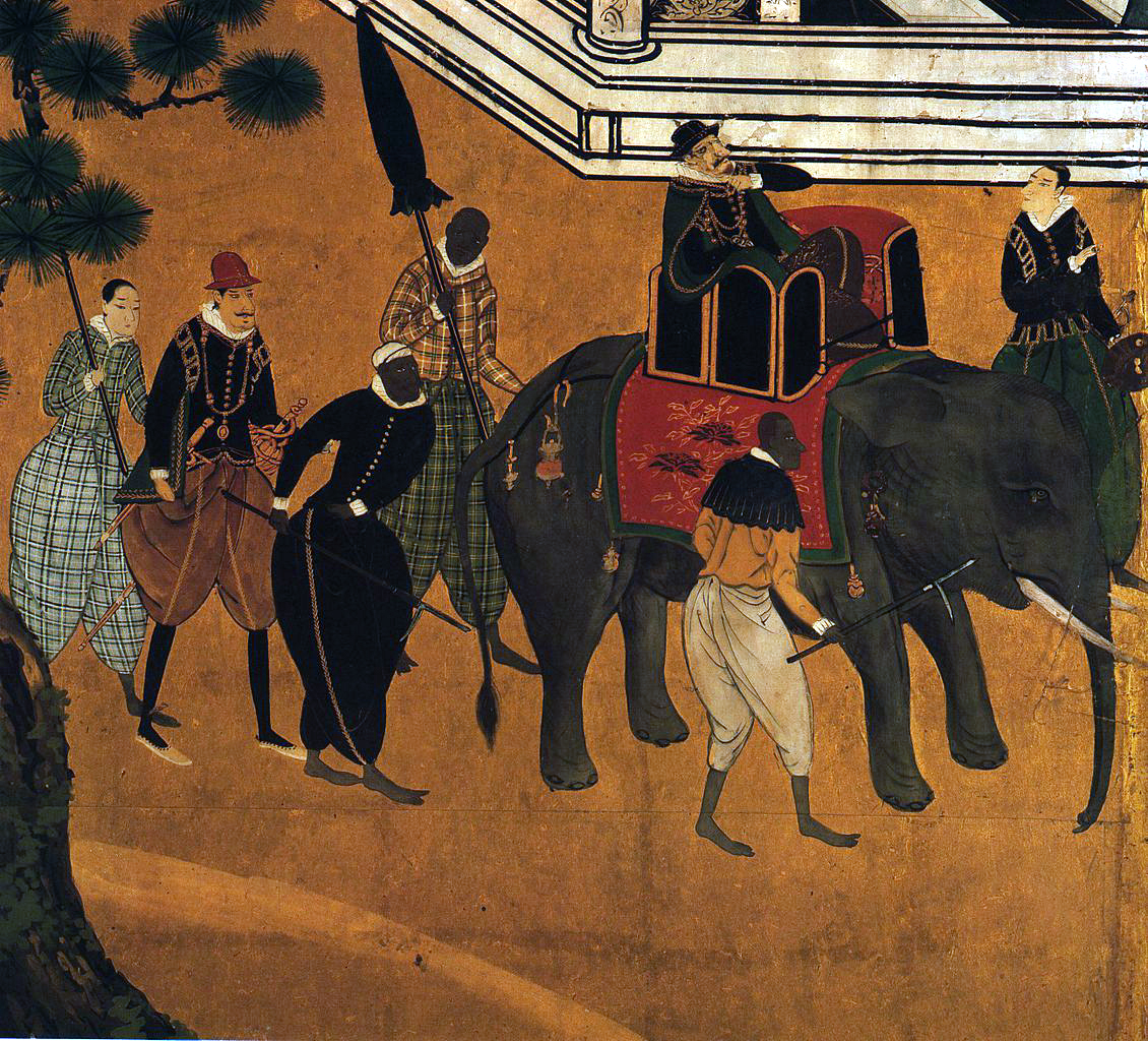 "Namban" art panels detail